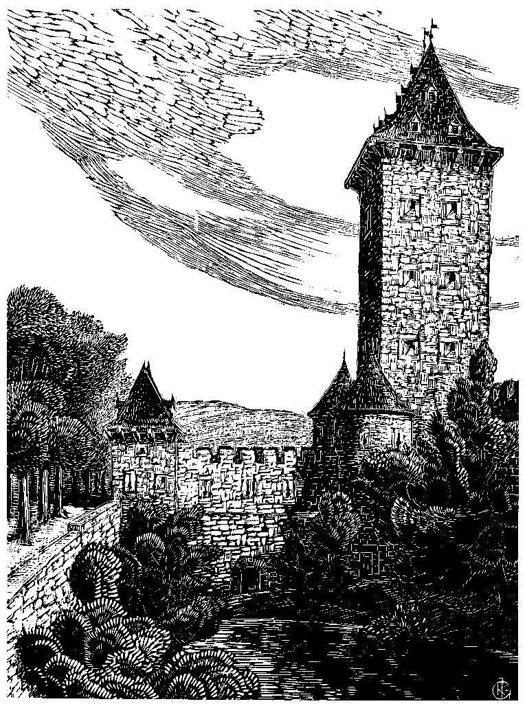 Sandkaultor, Aachen